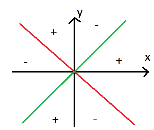 En tvådimensionell graf av apsadeln z=x^3-3xy^2. Den röda linjen är funktionen y=(-1/3)x medan den gröna linjen är funktionen y=(1/3)x. Grafen är delad i sex sektorer av de två funktionerna och y-axeln. Plus- och minustecknen visar om värdet på z är positivt eller negativt när x och y antar värden vid den platsen.